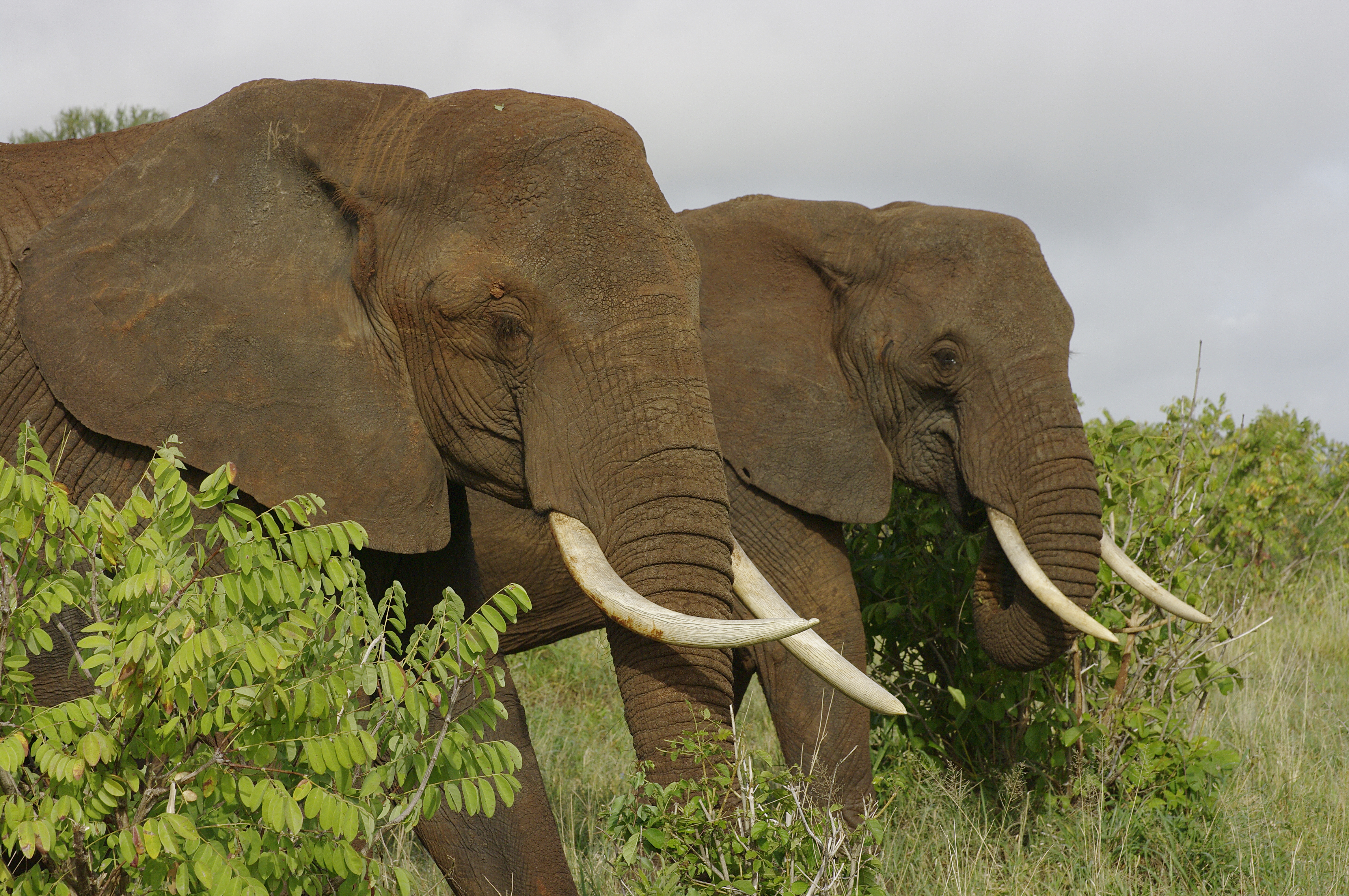 Éléphants (Loxodonta africana) en Tanzanie.